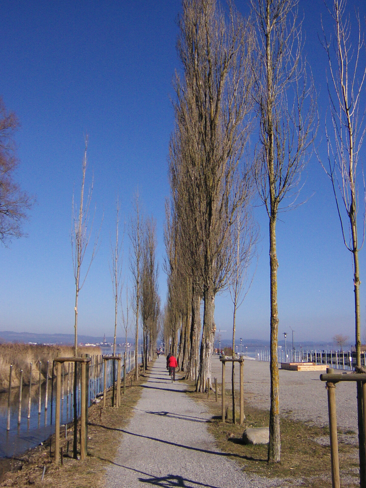 Uferpromenade in Moos bei Radolfzell